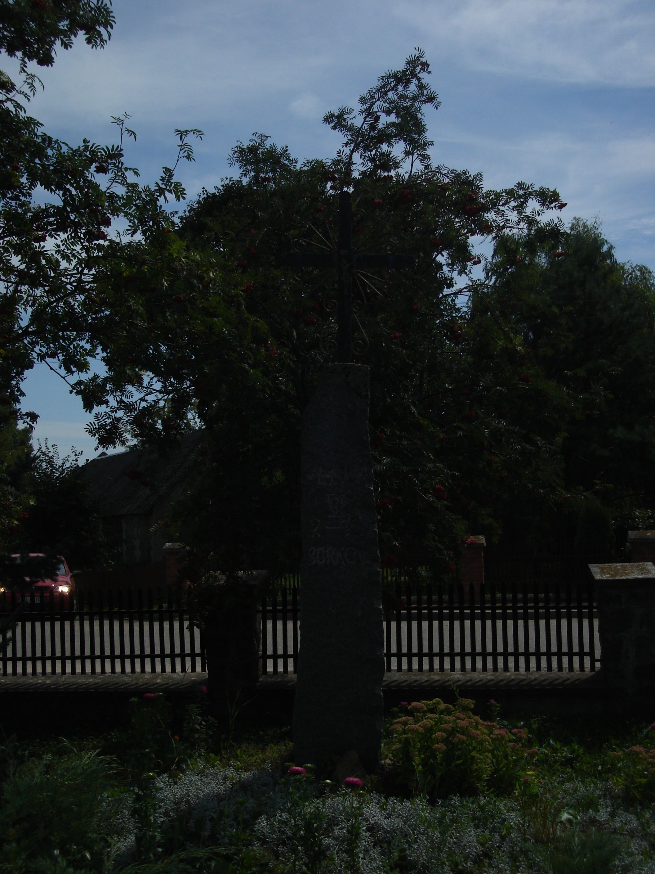 Krzyż na terenie kościoła w Borkowie